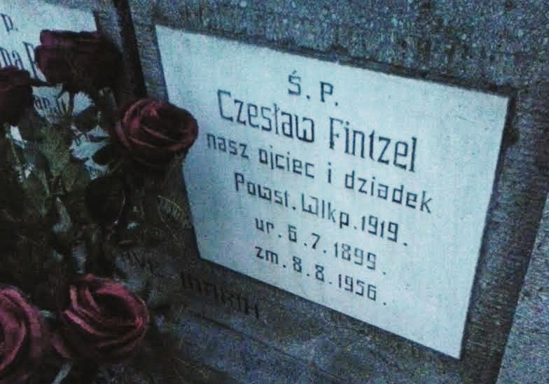 Cmentarz na Piątkowie w Poznaniu. Grób powstańca wielkopolskiego - Czesława Fintzela. Cmentarz parafii św. Stanisława Kostki w Poznaniu.